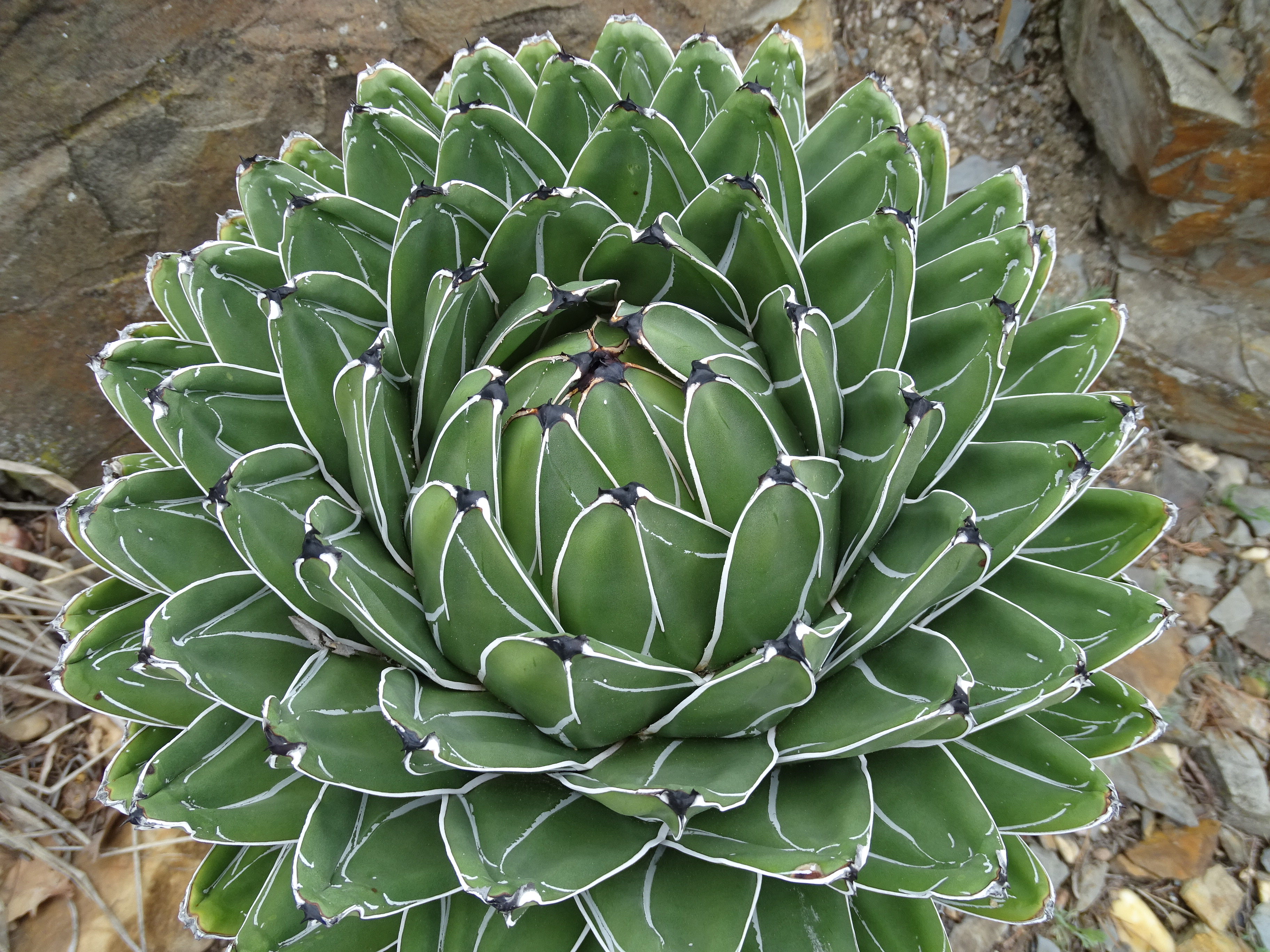 Botanická zahrada Praha